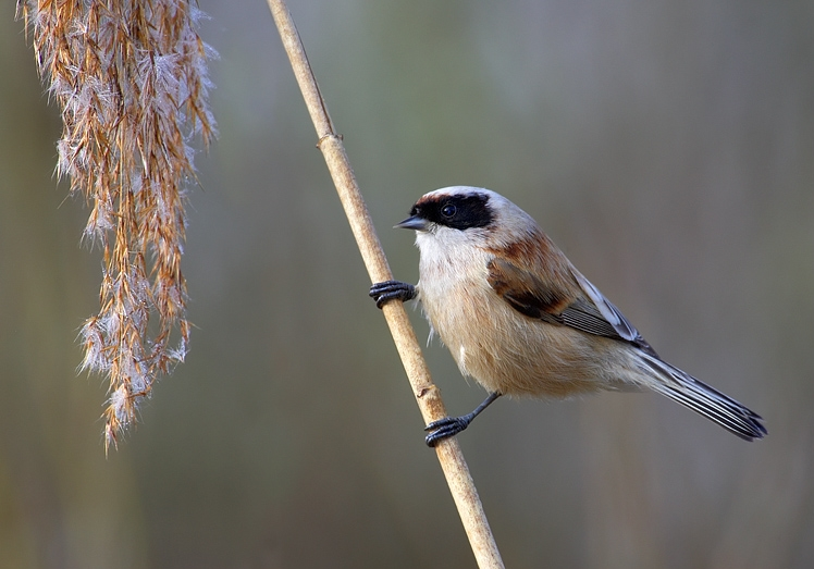 Remiz pendulinus, Olomoucko, CZ